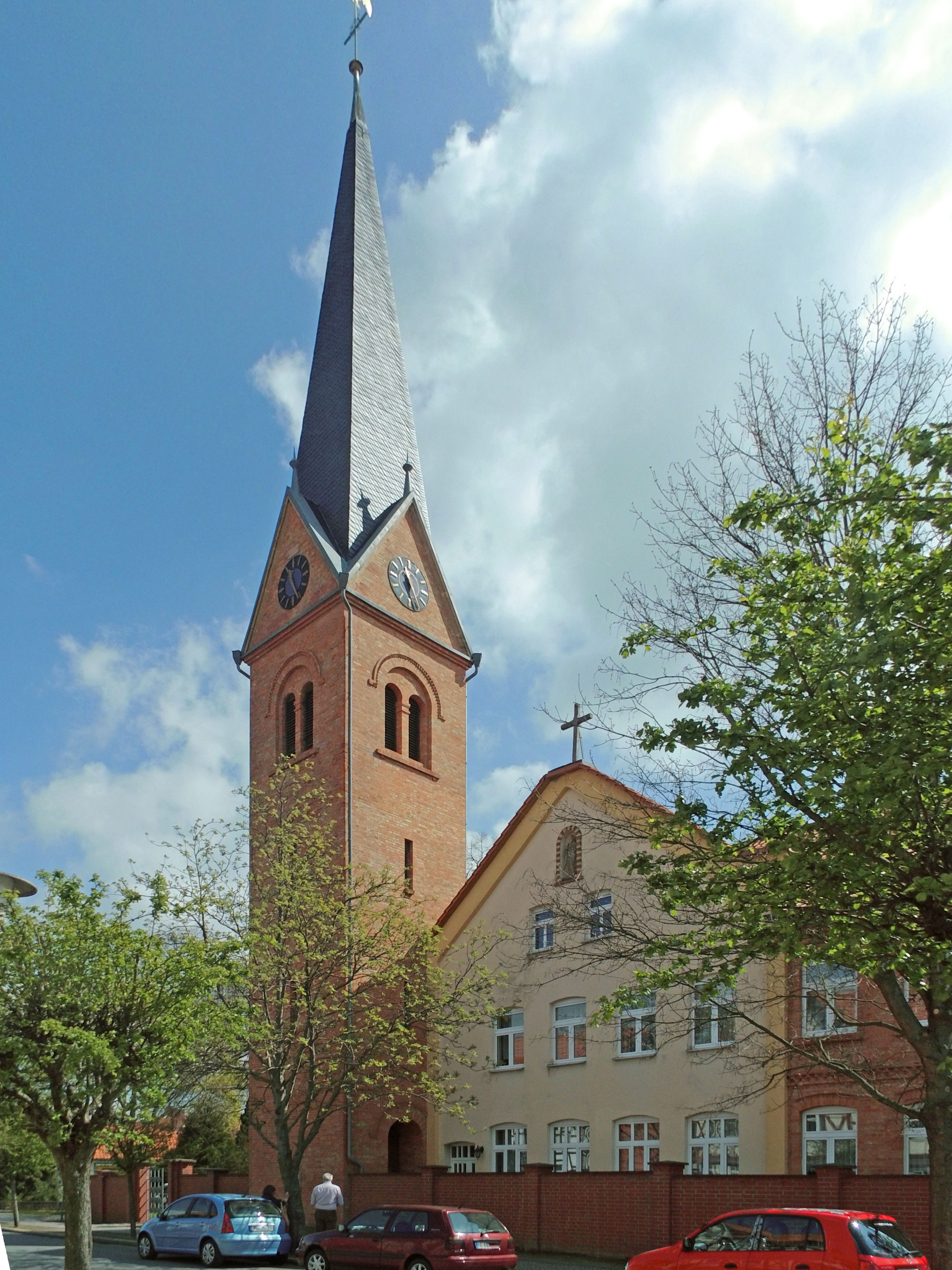 Katholische St.-Joseph-Kirche in Osterwieck, Blick von Westen.